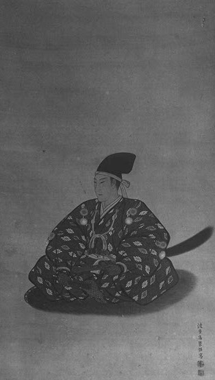 松前徳広の肖像。